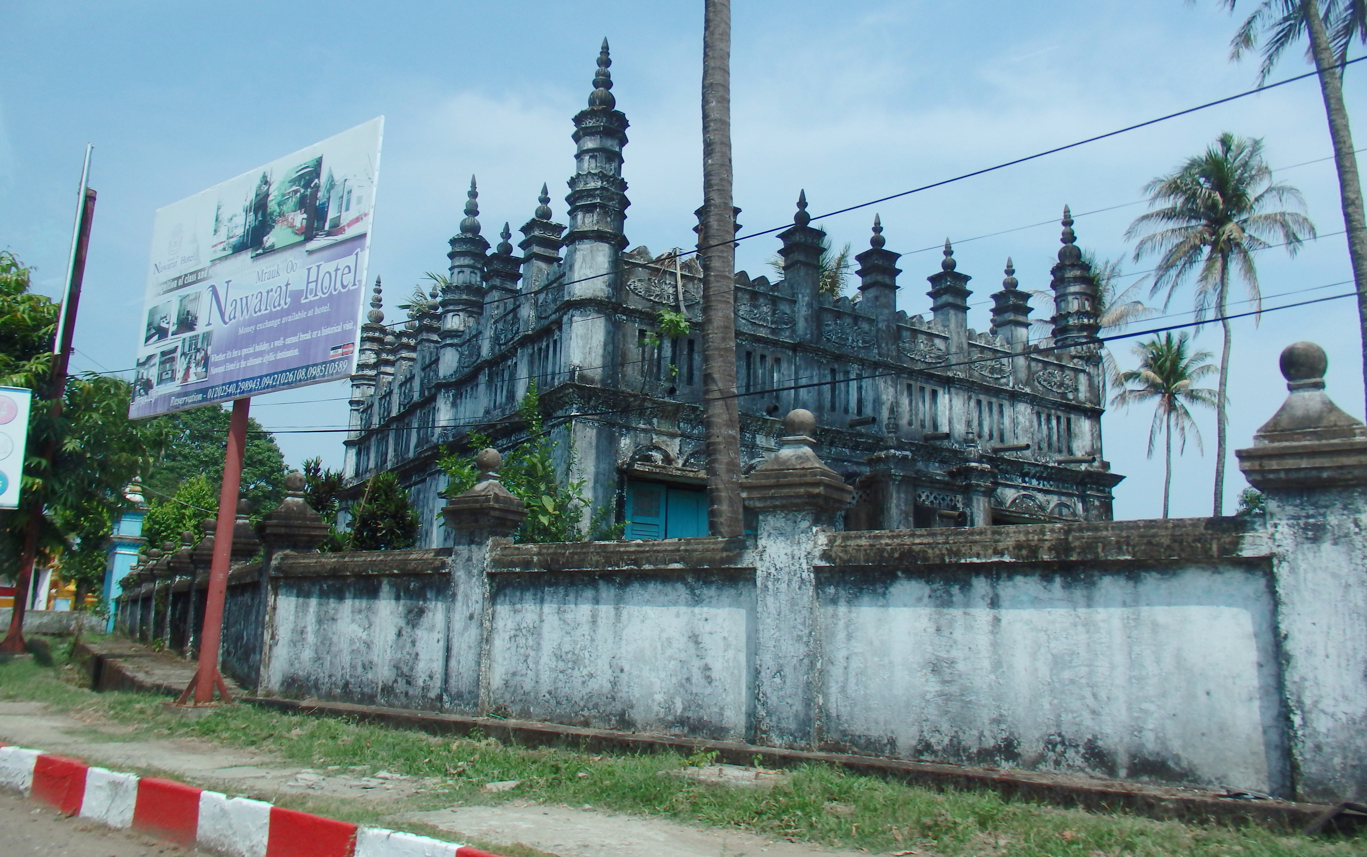 Closed Mosque